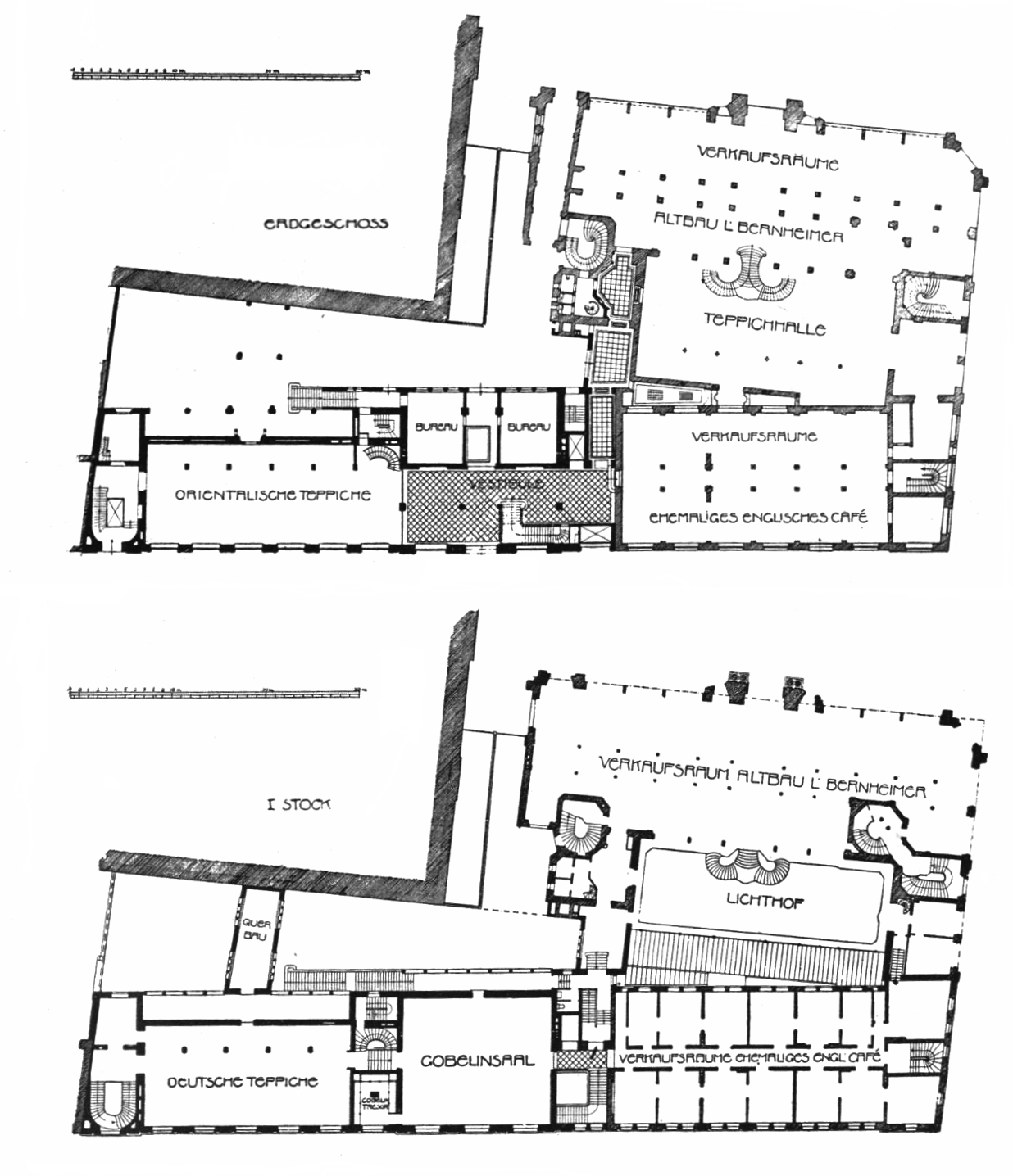 Haus Bernheimer, München, Deutschland. Grundrisse der beiden Verkaufsgeschosse im Erdgeschoss und 1. Stock. Der Plan gibt den Zustand 1912 wieder, nach der Errichtung des Anbaus zur Ottostraße (hier unten)